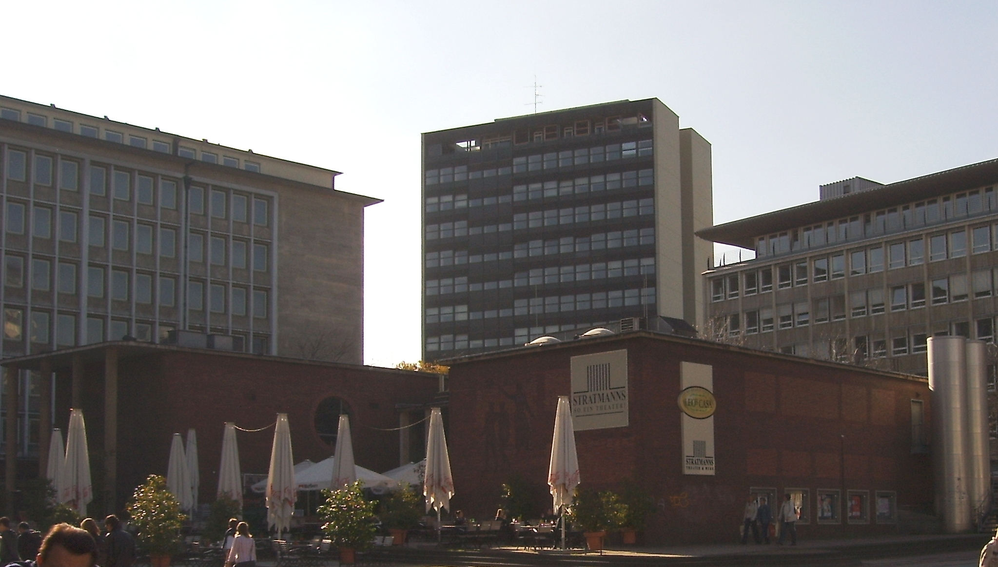 Stratmanns Theater, Kleinkunstbühne Dr. Ludger Stratmann, Europahaus, Kennedyplatz